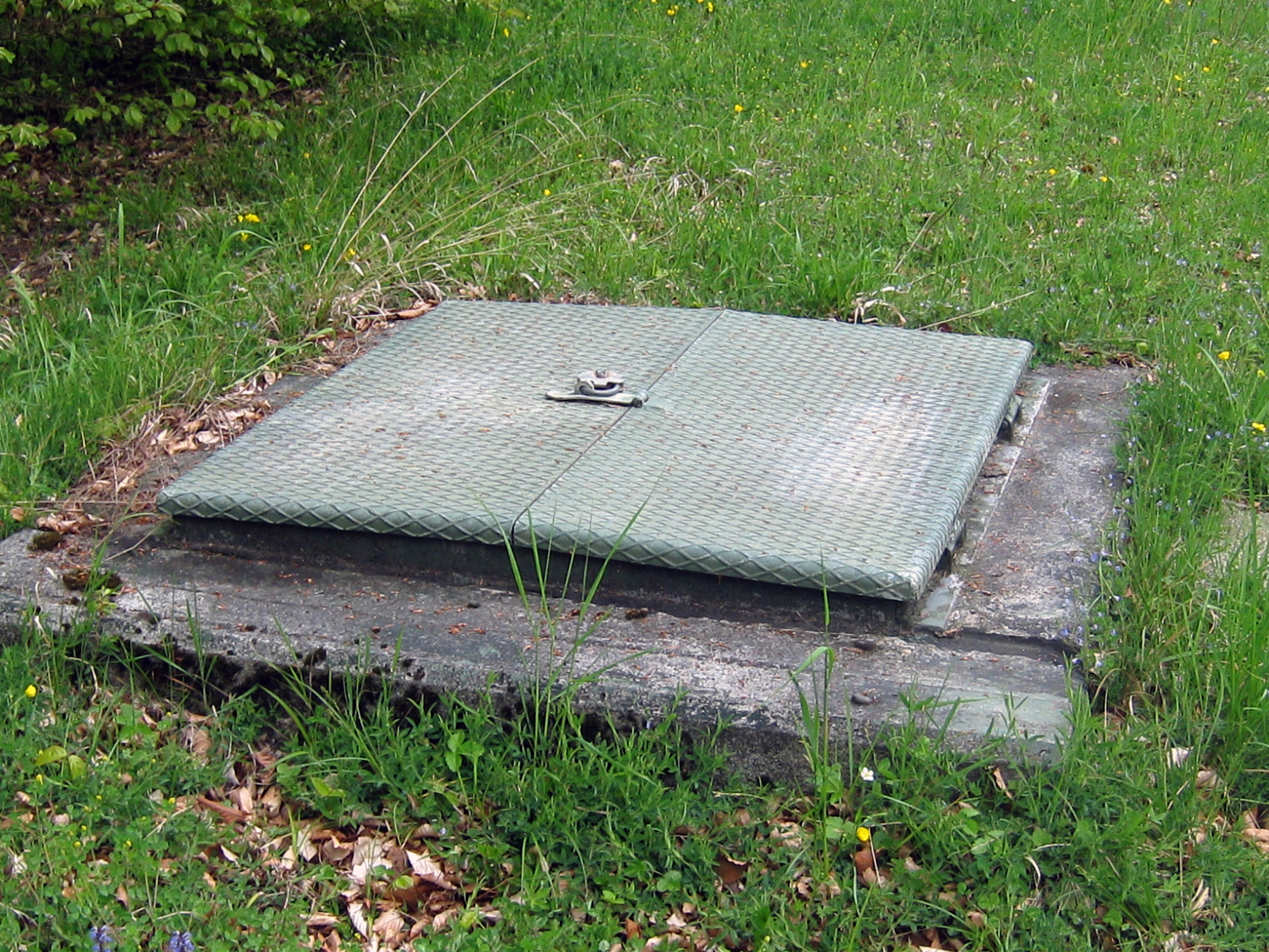 Kastels Eingang 1